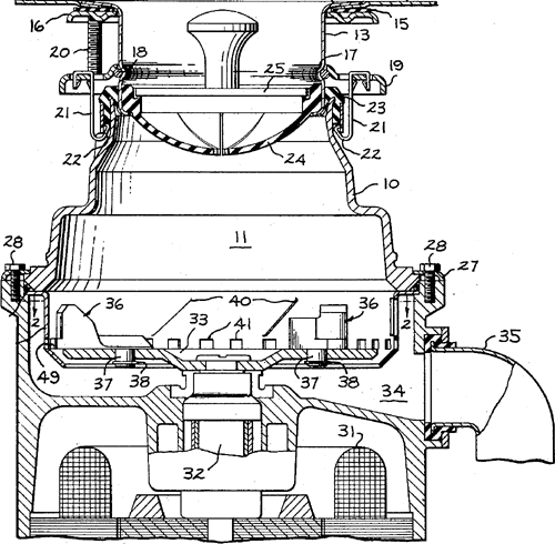 Inner workings of an in-sink garbage disposal unit